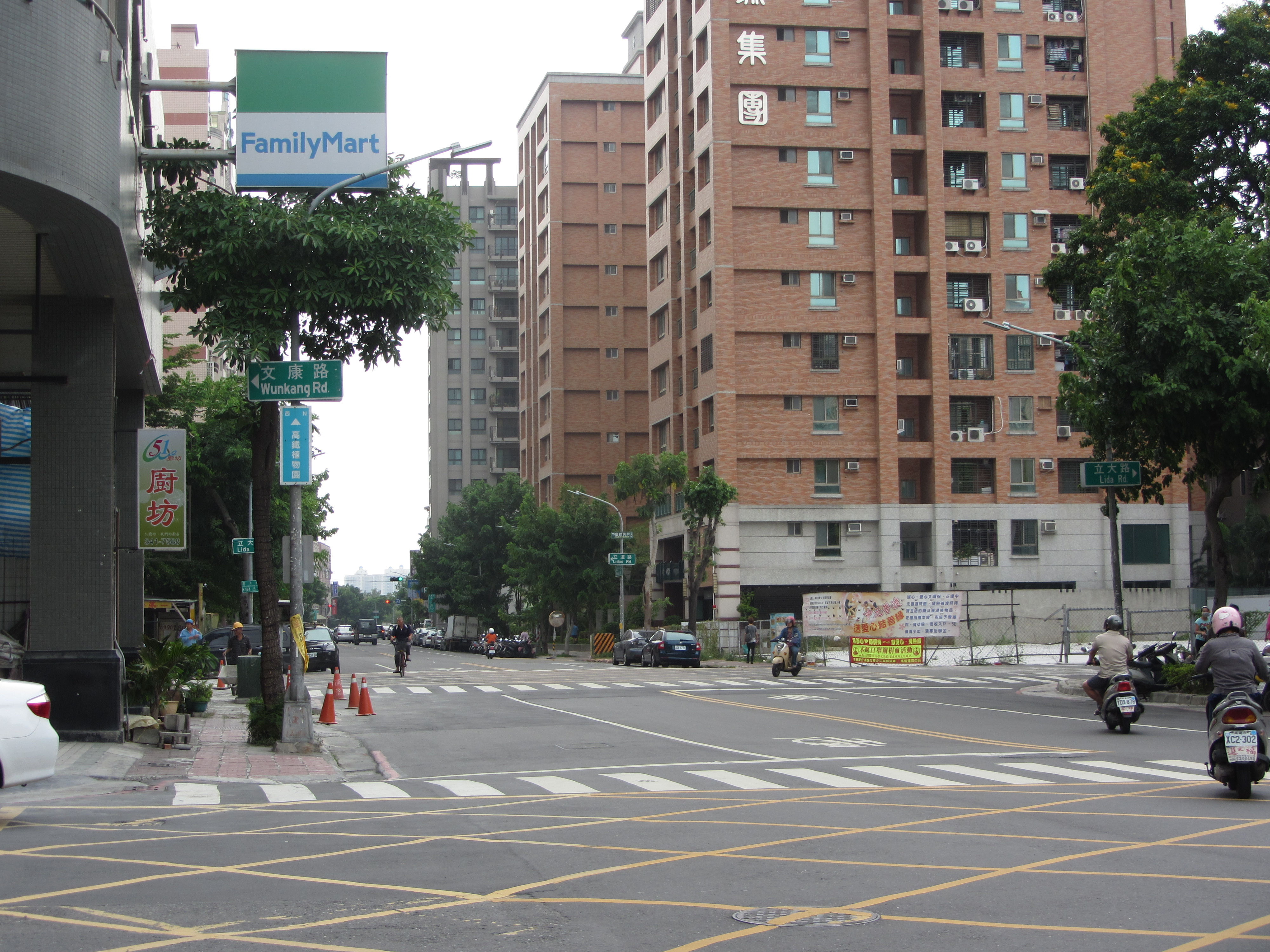 高雄市左營區孟子路